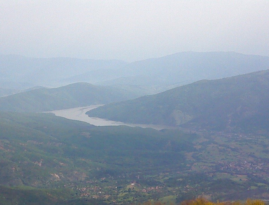 Панорама на с.Ѓавато, с.Доленци с.Лера и езеро Стрежево